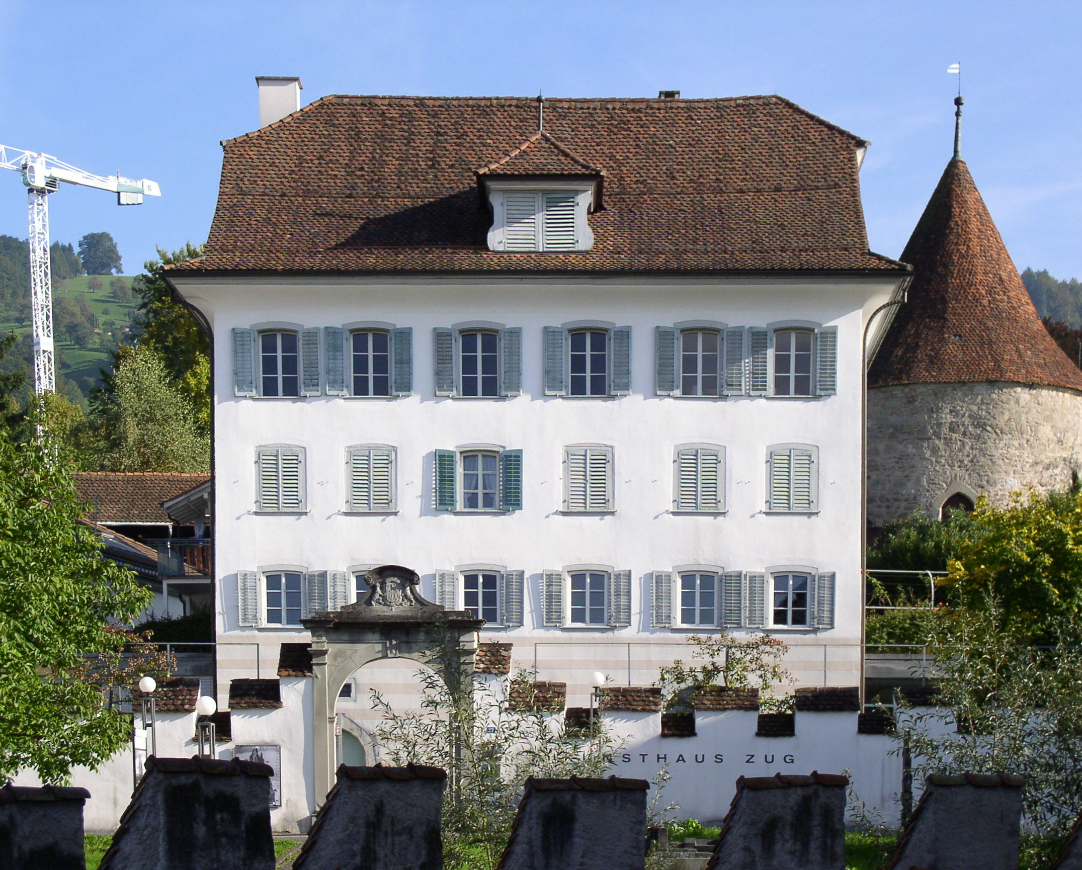 Kunsthaus Zug. Im Hintergrund der Huwilerturm.